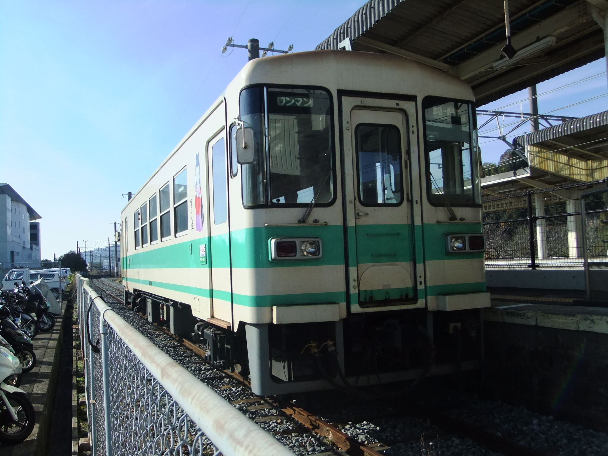 紀州鉄道 KR301 御坊駅